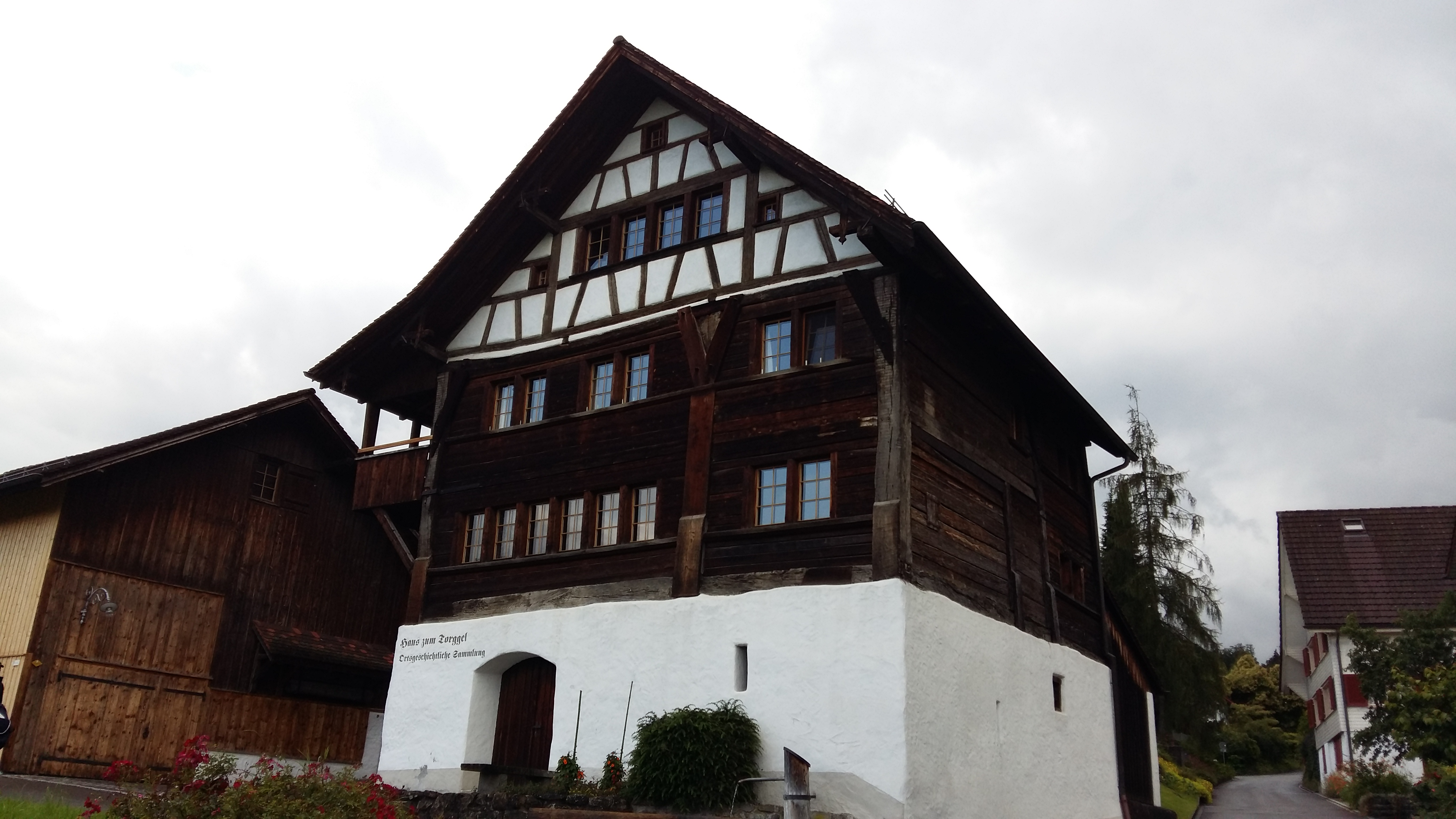 Das Haus zum Torggel wurde im 17.Jahrhundert erbaut und beherbergt nebst einem Torggel aus dem 17.Jahrhundert auch die Ortsgeschichtliche Sammlung von Berneck.